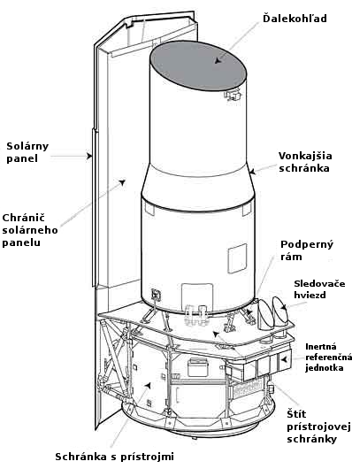 Nákres Spitzerovo vesmírneho ďalekohľadu